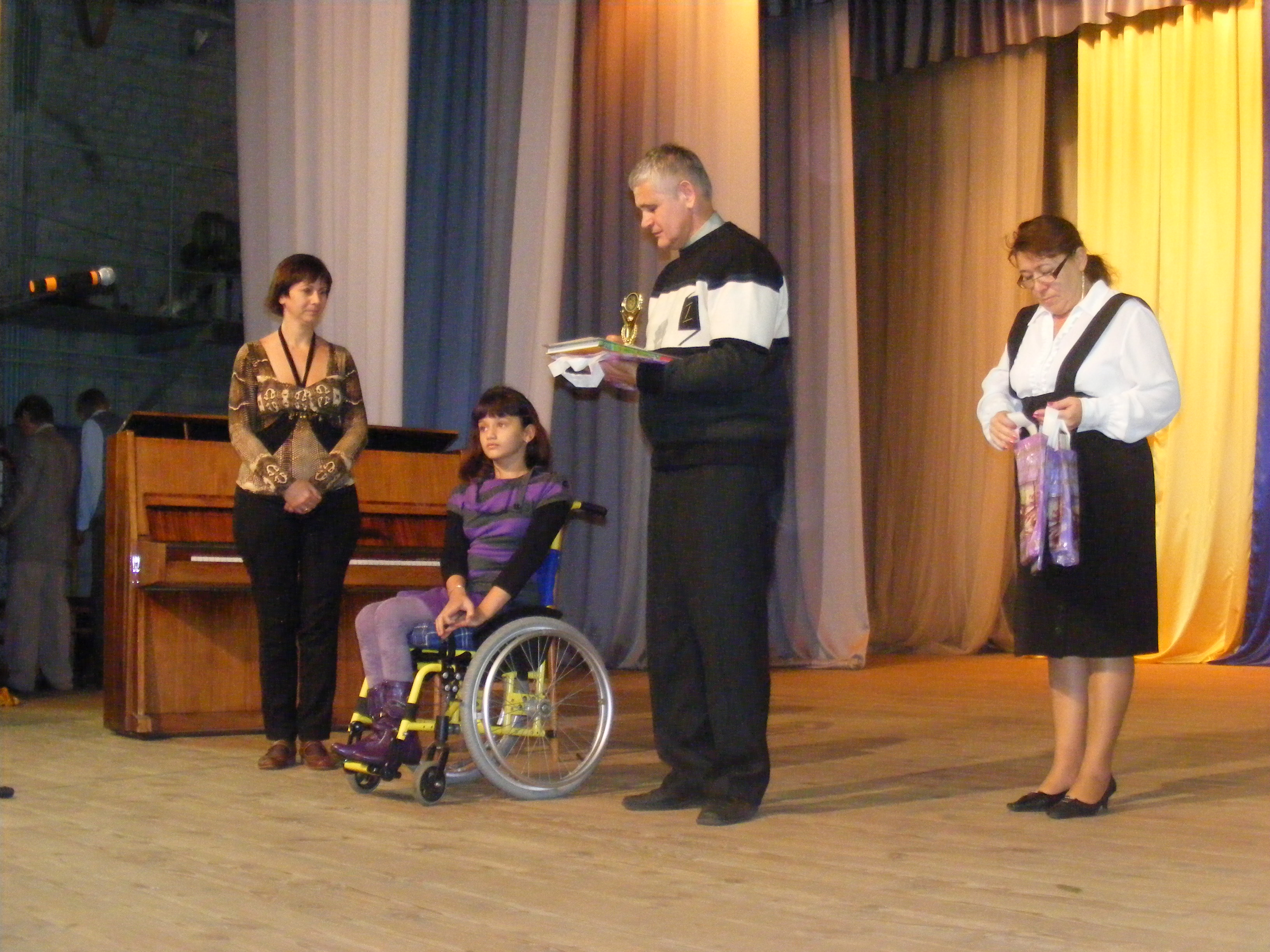 Нагородження Олександри Берегути (Вінниця). Номінація "Дитяча творчість". підномінація "Декоративно-ужиткове мистецтво", 2 місце